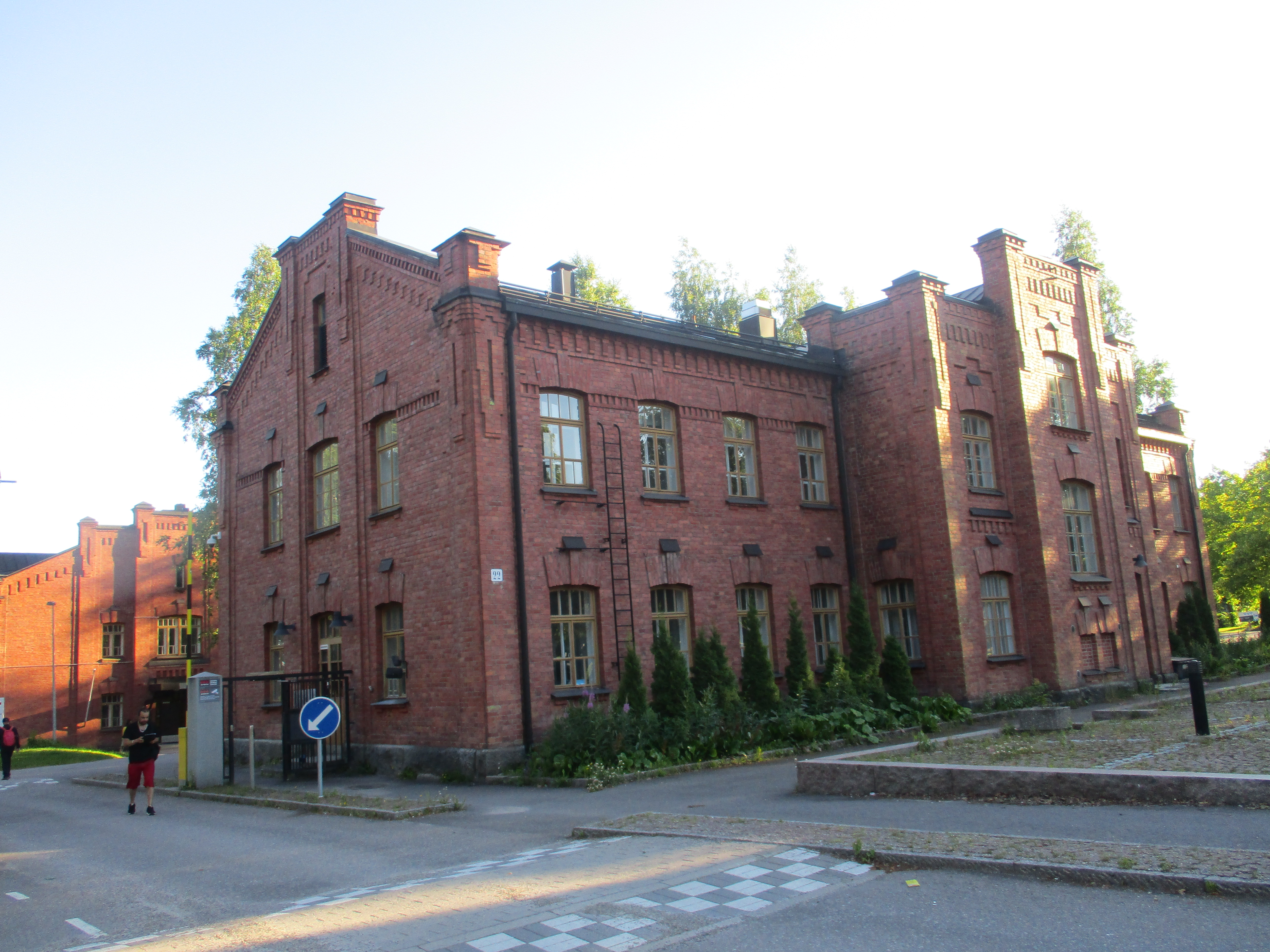 Lahden varuskunta